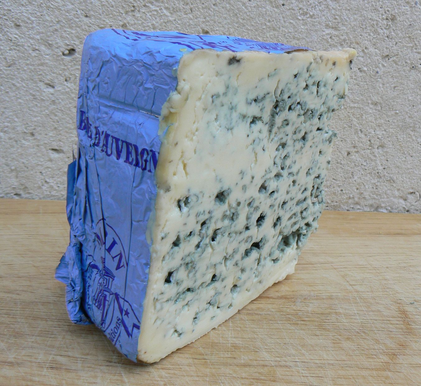 Un tros de formatge blau d'Alvèrnia fet a Aurillac (Occitània). Al paper es pot migllegir el seu nom en francès "bleu d'Auvergne".